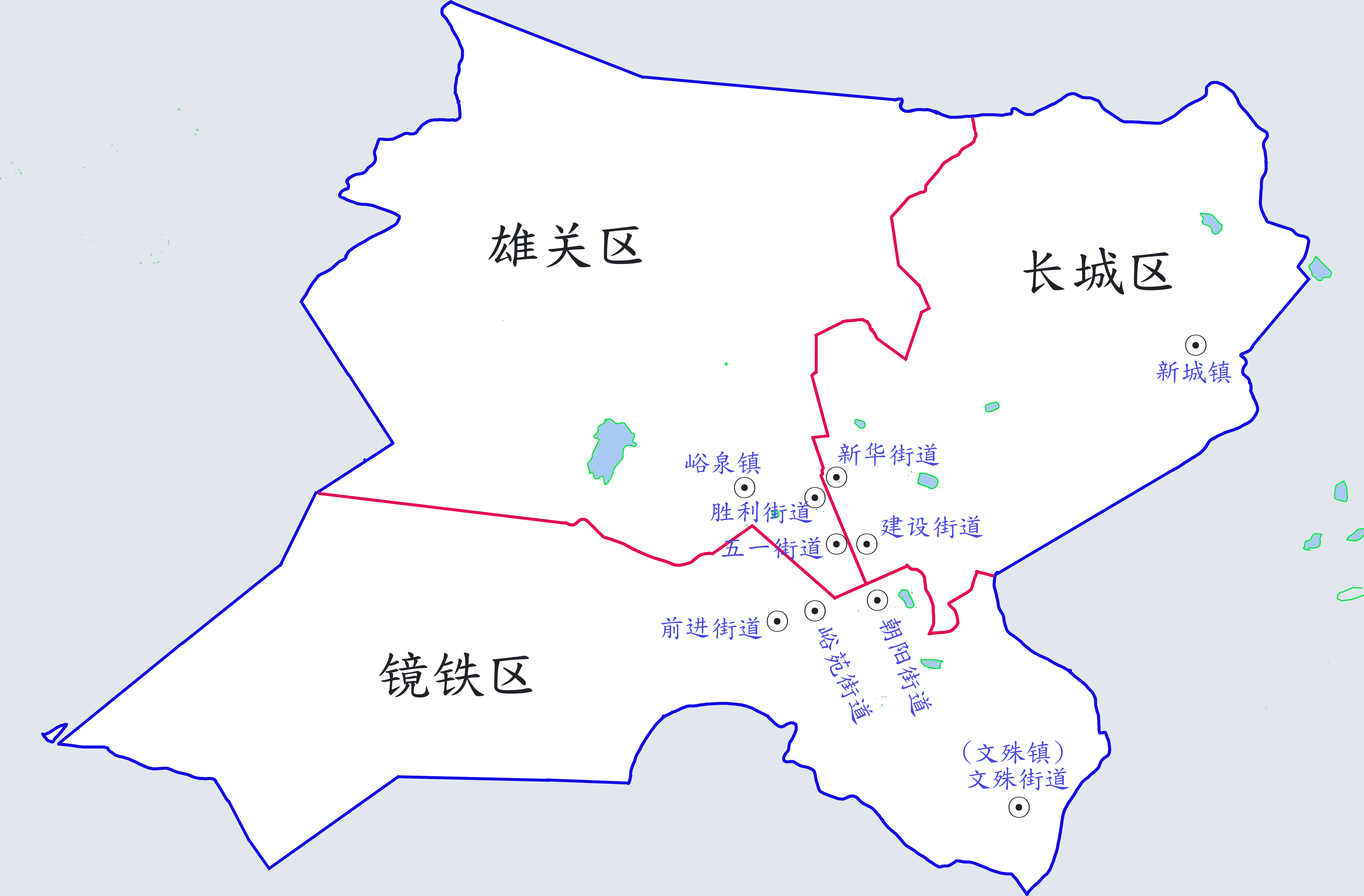 간수성 자위관시